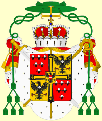 Герб эрцгерцога, Великого Магистра Тевтонского ордена (1618-1624) Карла Австрийского.